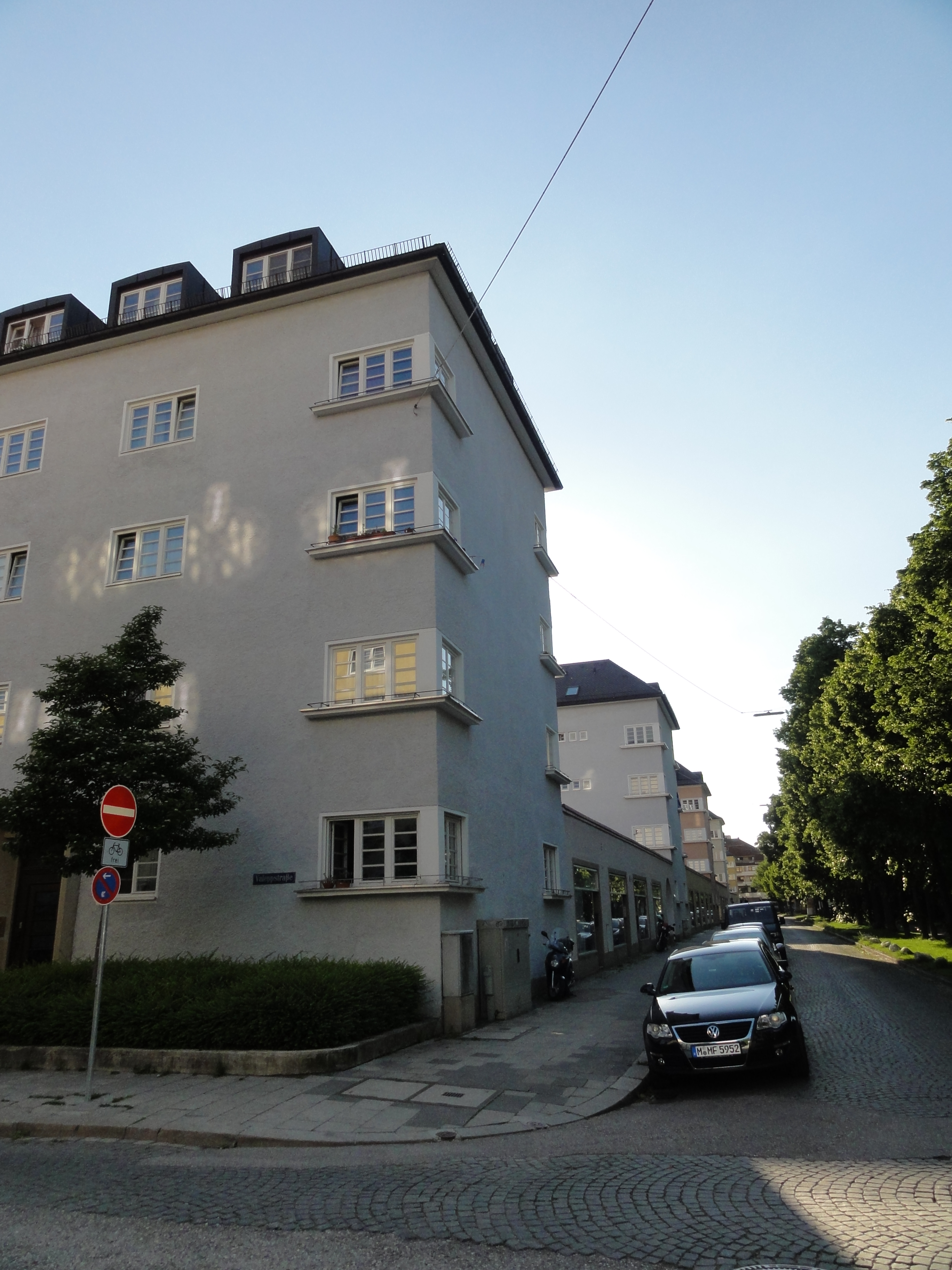 Munich